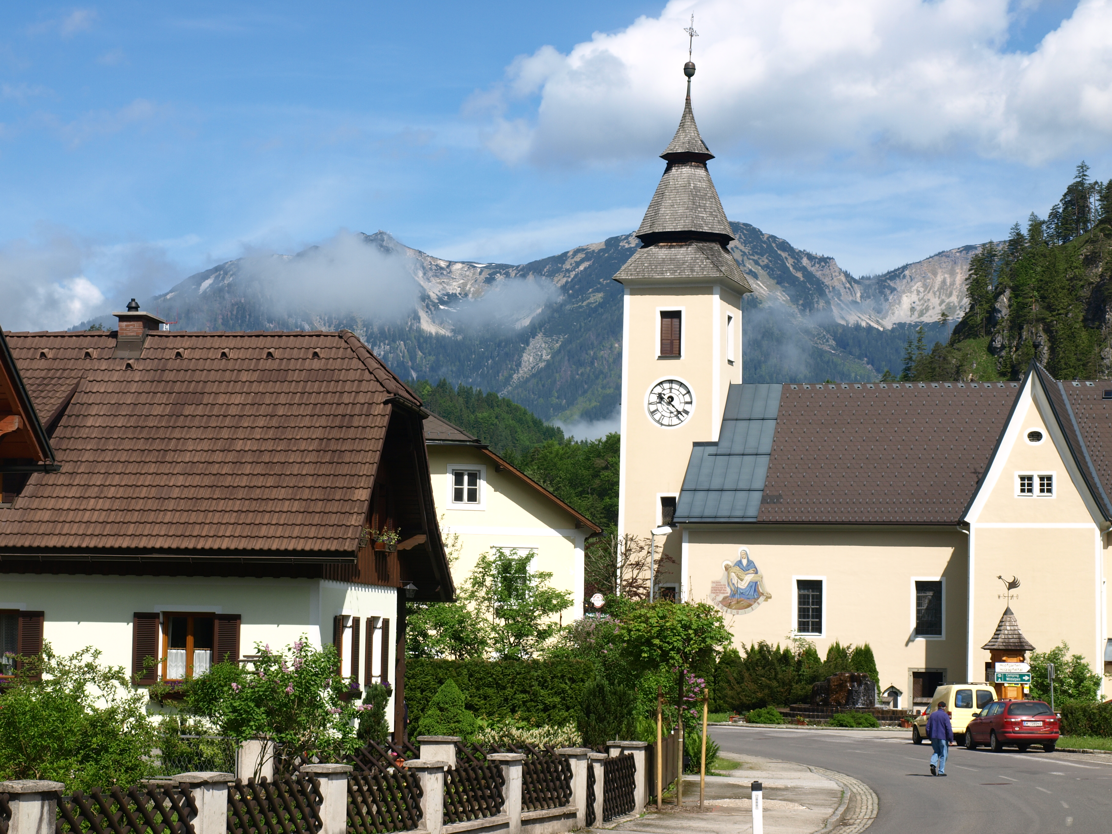 Kath. Pfarrkirche hl. Barbara